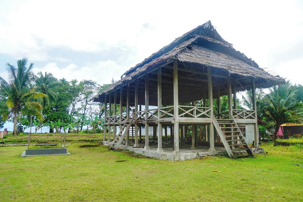 Baileo Negeri Siri Sori Amalatu (Siri Sori Kristen)